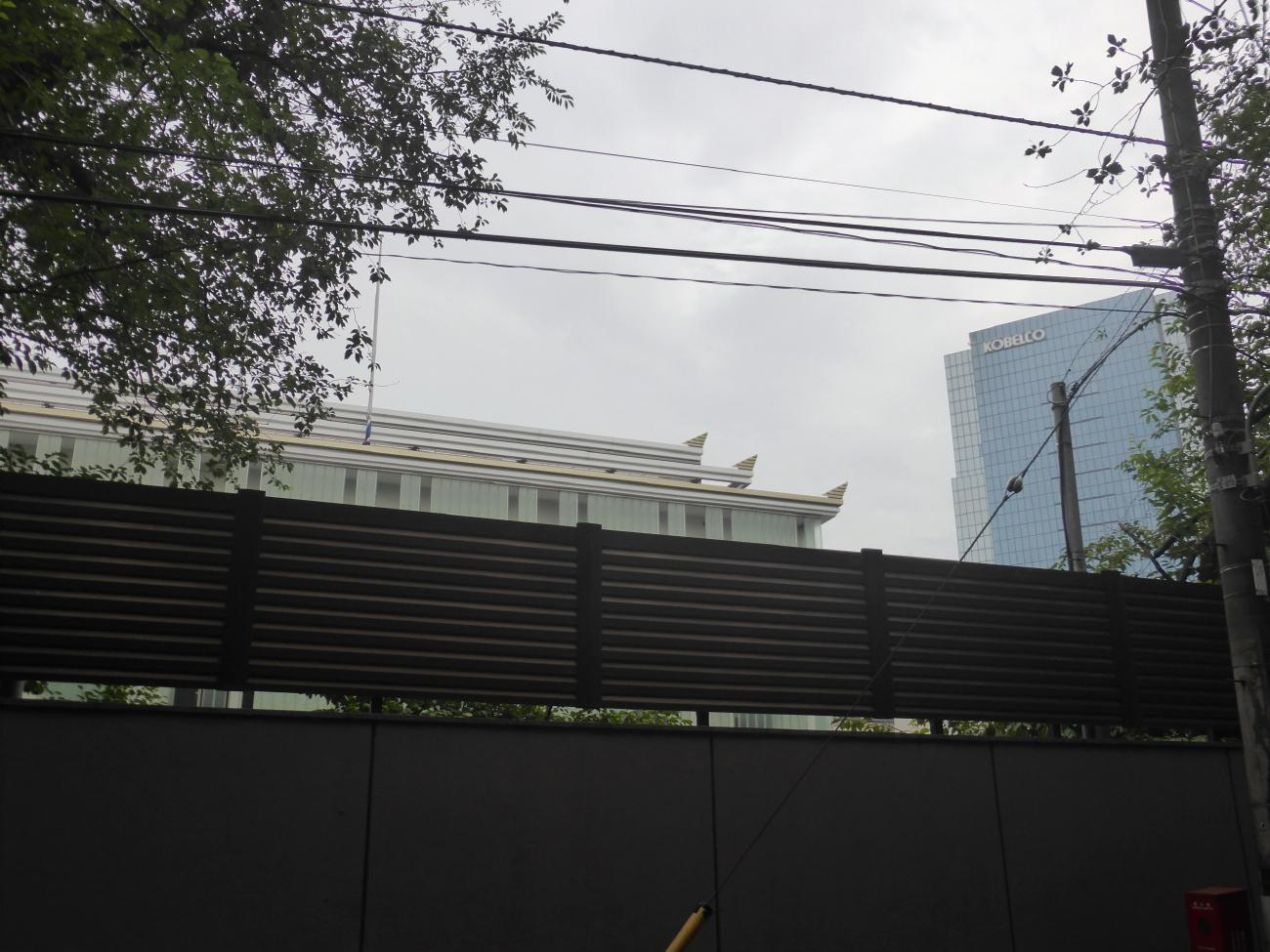 塀に囲まれているミャンマー大使館